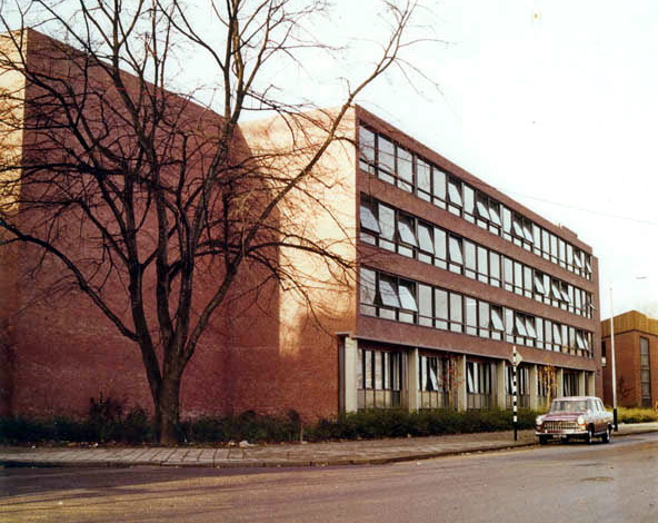 Het Sint-Maartenscollege in Maastricht, kort na de verhuizing naar de nieuwbouw aan de Noormannensingel in 1966. Fotocollectie RHCL Maastricht, GAM 21984.